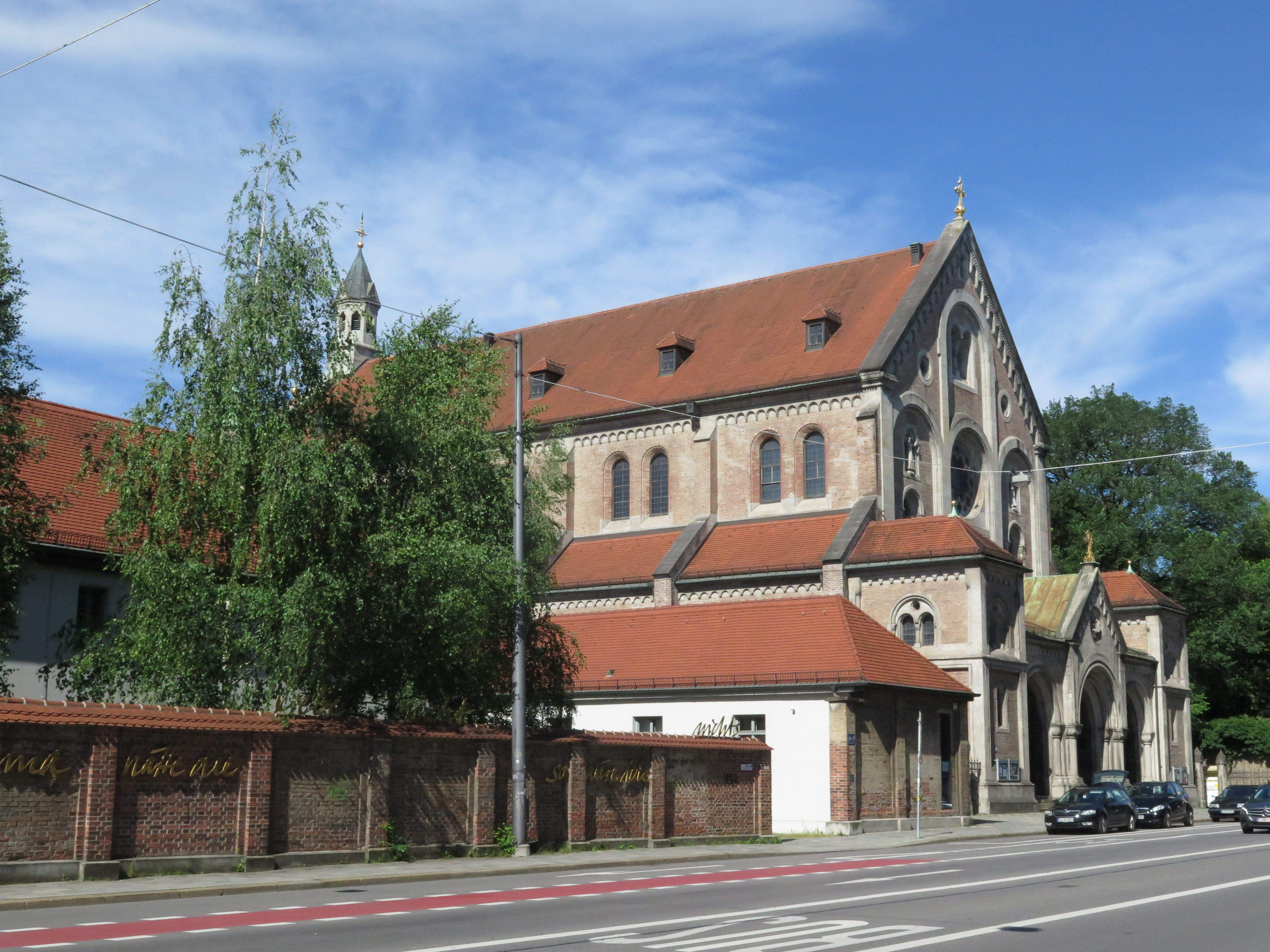 Kirche des ehemaligen Kapzinerklosters St. Anton in der Kapuzinerstraße im München Stadtteil Isarvorstadt, links hinter der Klostermauer ist das Institut zur Förderung publizistischen Nachwuchses, ifp